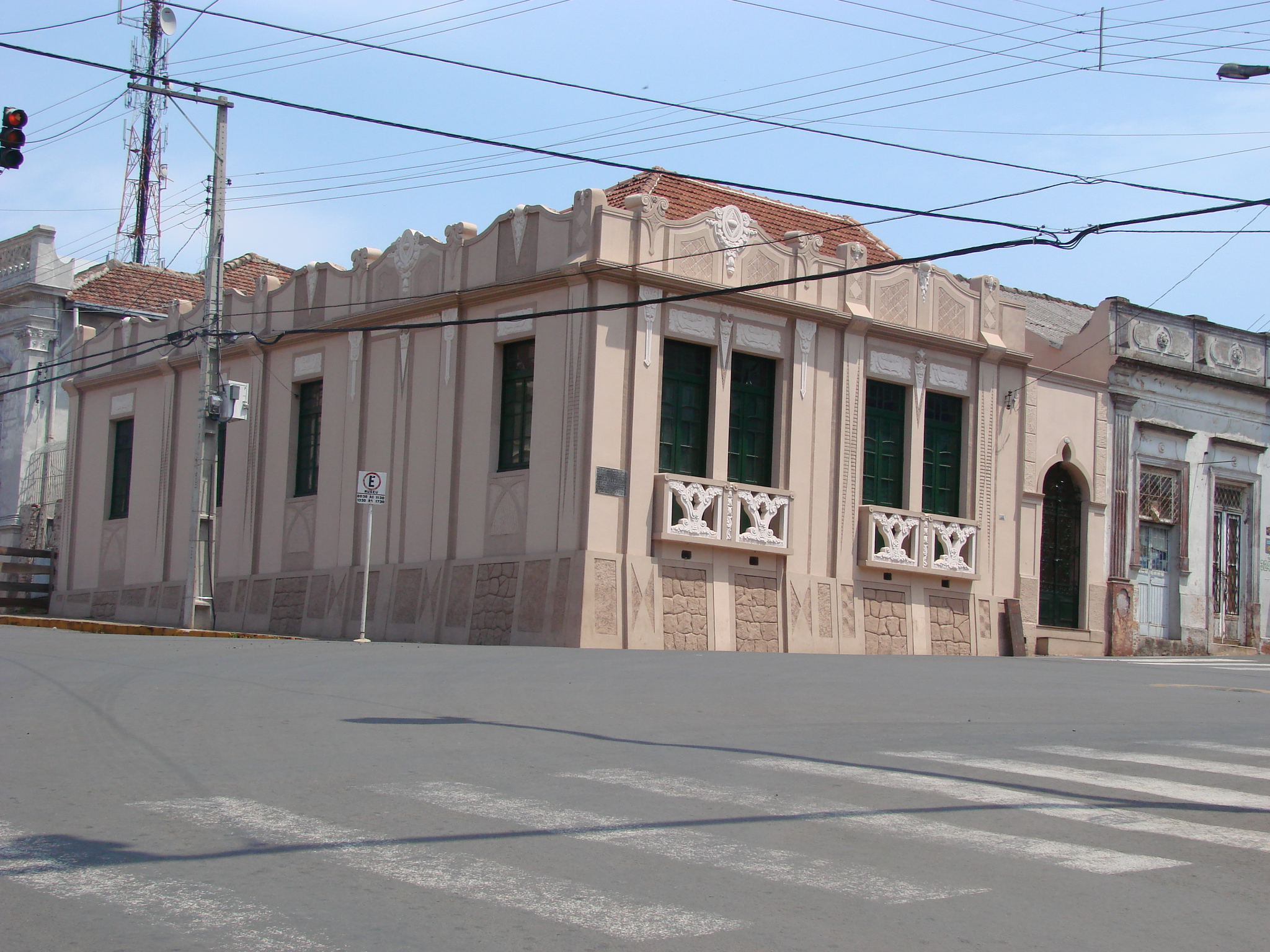 Museu Érico Veríssimo, outrora a casa do escritor, em Cruz Alta, na esquina das avenidas General Osório e General Câmara .